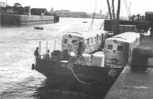 Los dos cuerpos delLDI en la barcaza Alsina, esperan ser descargados a las chatas del F.C.S. Muelle Este del Dock Sud. 1937. Foto Ferrocarril Midland, colección del Centro de Estudios Históricos Ferroviarios